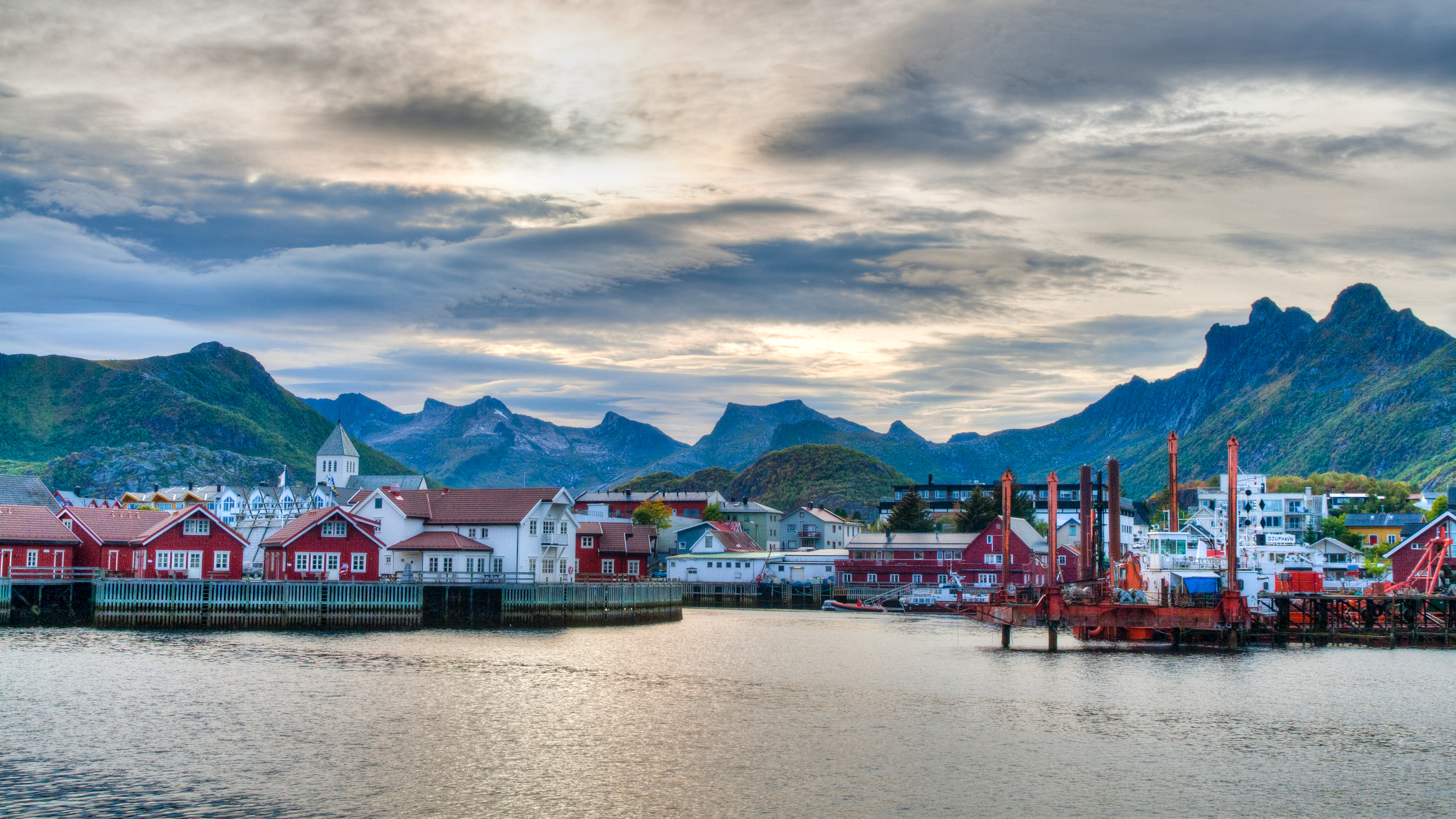 Svolvær